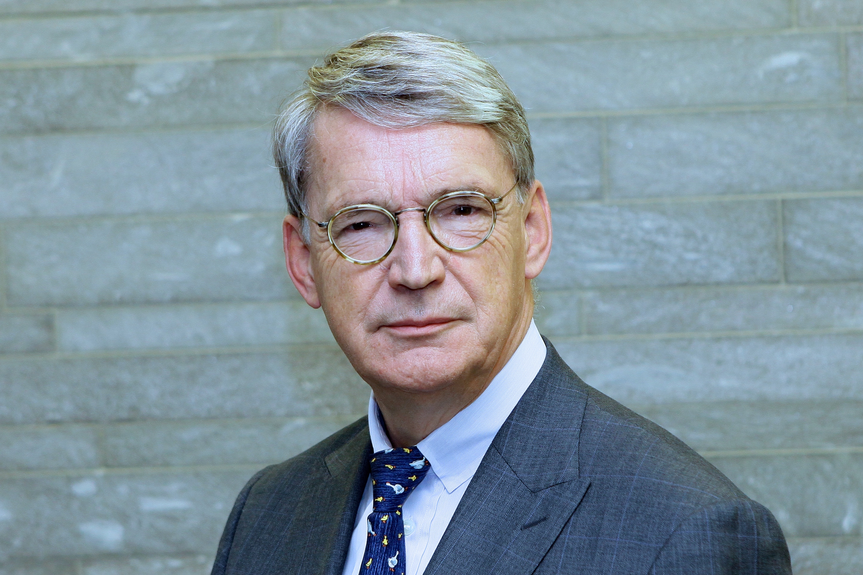 Andreas de Maiziere